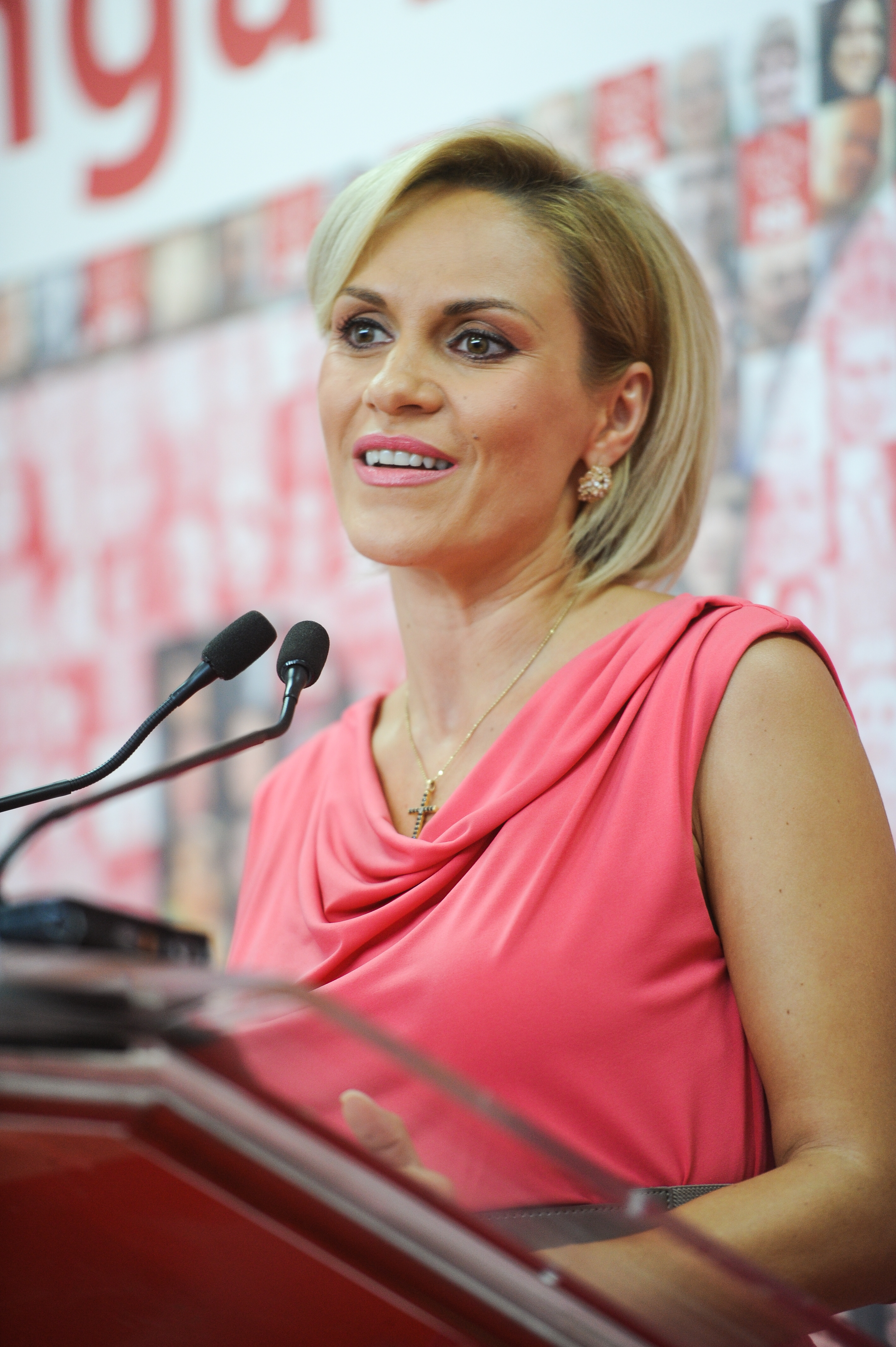 Gabriela Firea la sediul PSD - 02.09.2014